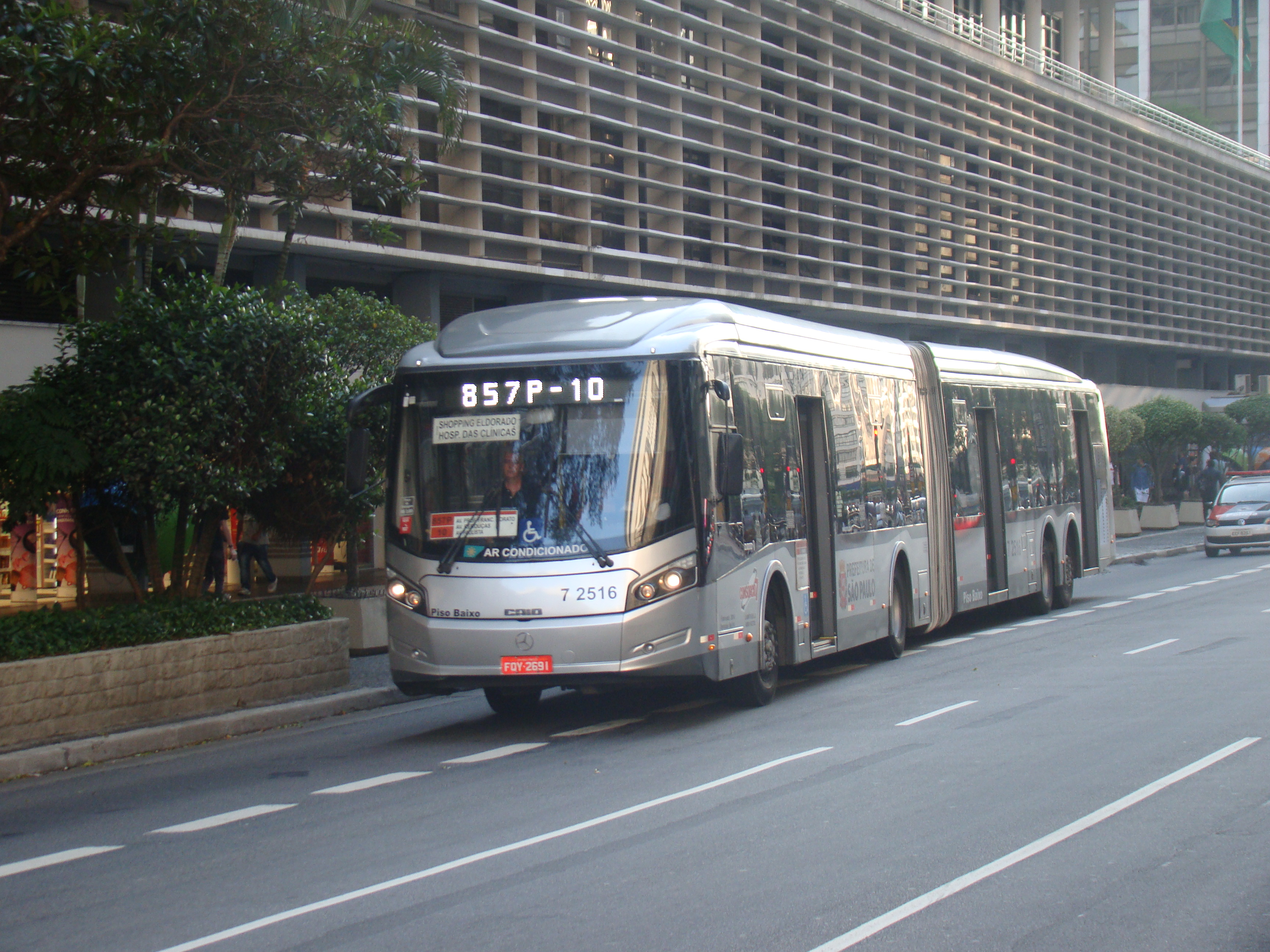 Caio Millennium BRT da viação Campo Belo, operando a linha 857P-10, Paraíso / Terminal Campo Limpo.